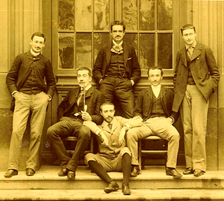 Quelques élèves des promotions 1889/1890 de l'école normale supérieure, rue d'Ulm (Paris). Debout au centre, Raoul Versini. Avec une pipe, Alain. Debout à droite, Léon Blum. Photographe inconnu, collection famille Versini et Wallon.